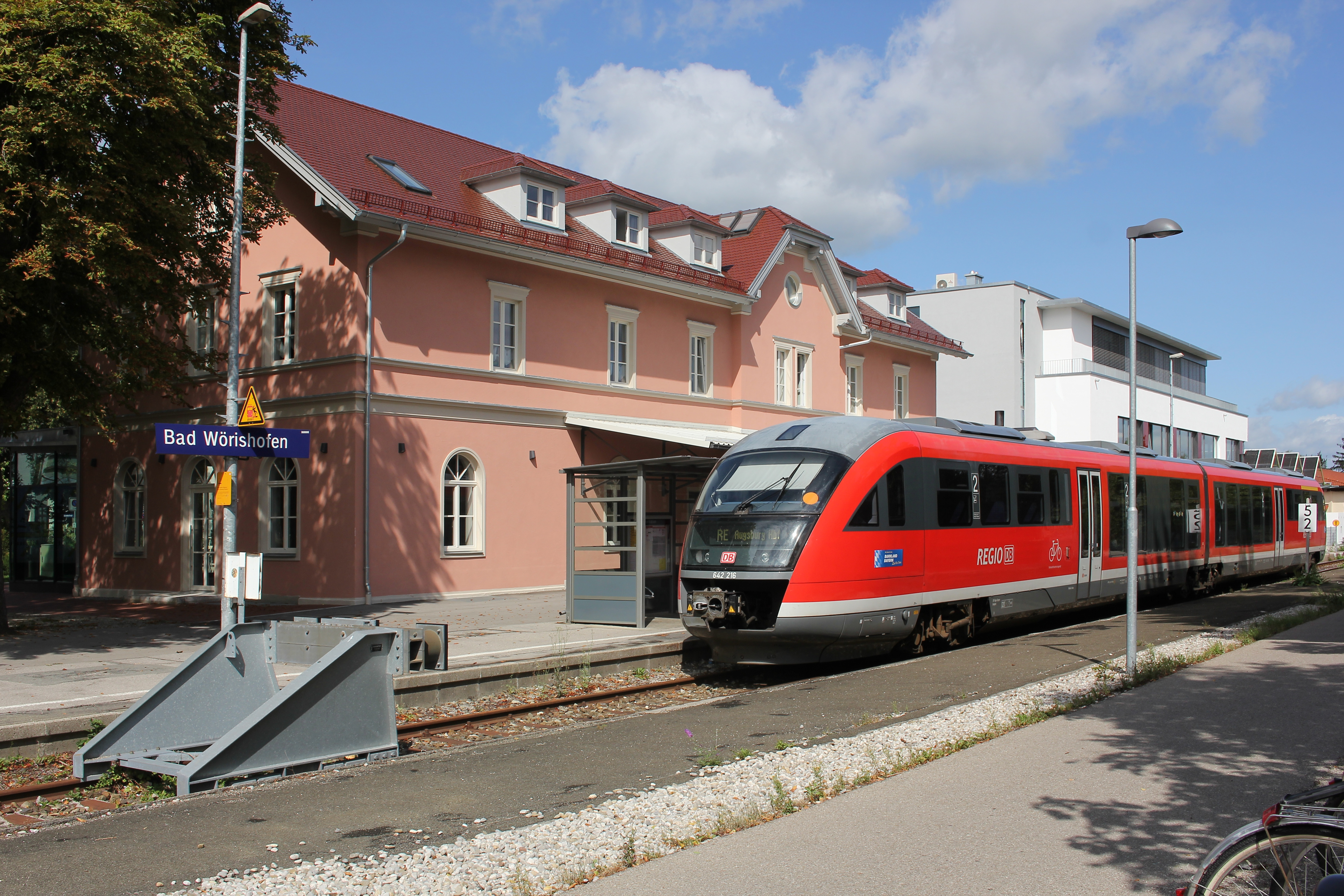 Triebwagen der Baureihe 642 im Bahnhof Bad Wörishofen.